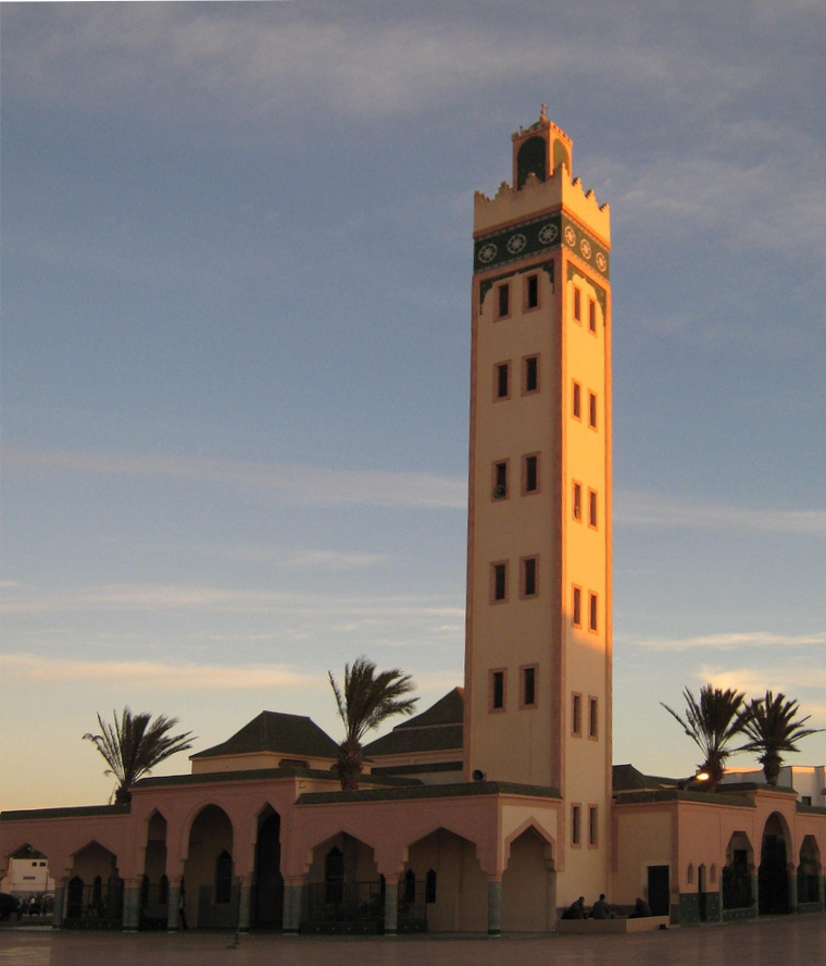 Mezquita en Dajla (Sahara Occidental)